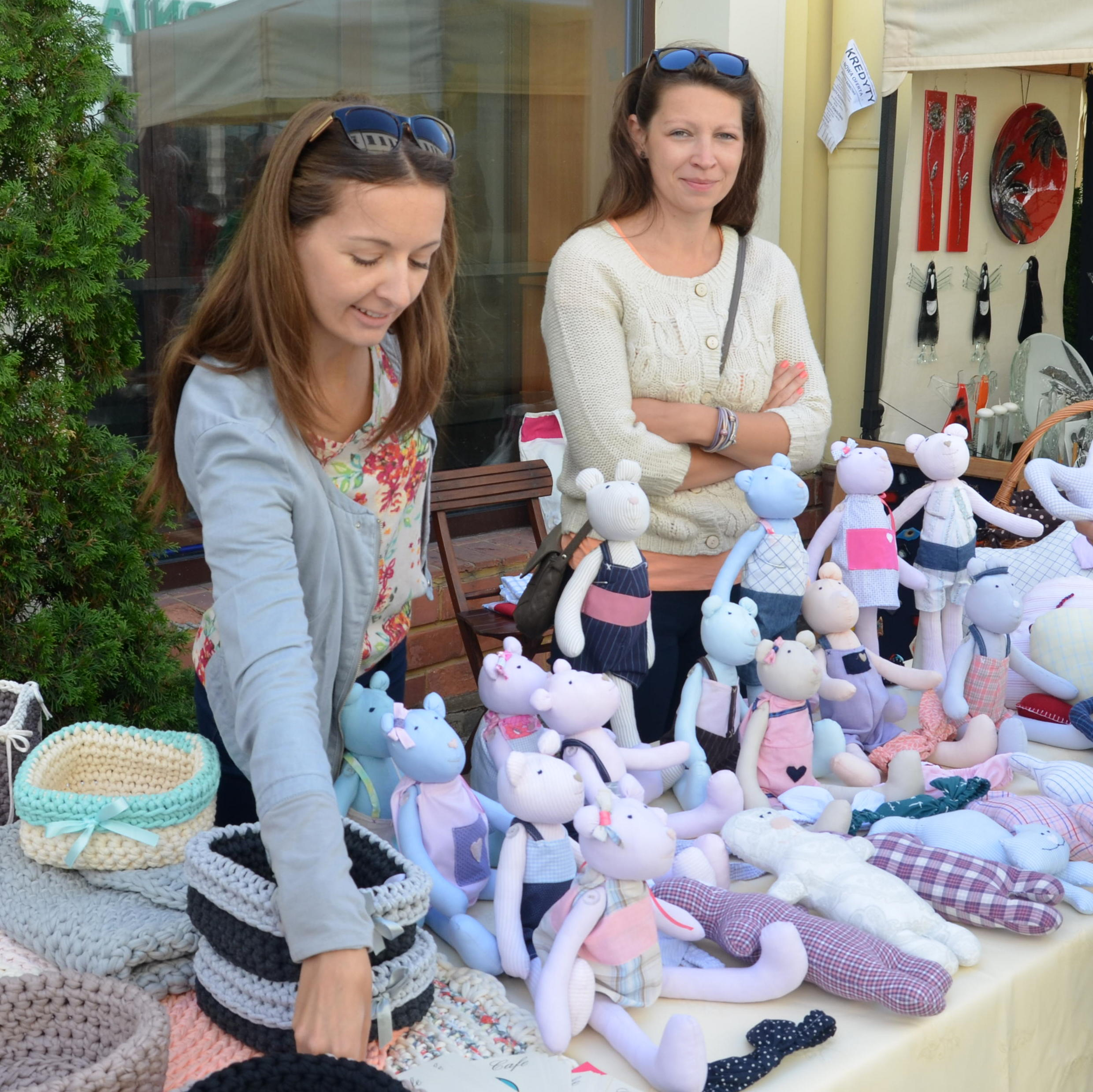 Jahrmarkt in Sanok